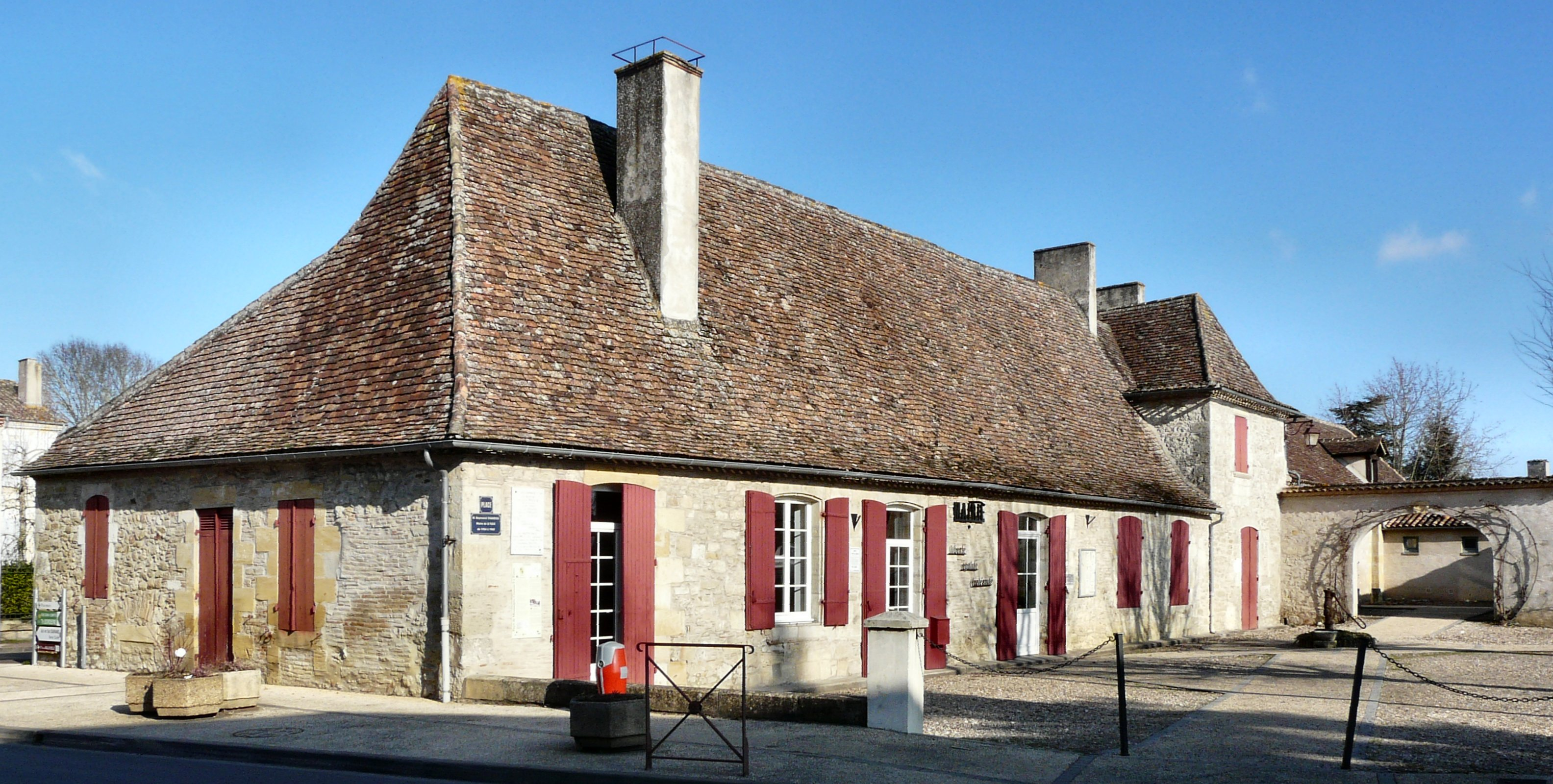 La mairie de Le Fleix en Dordogne